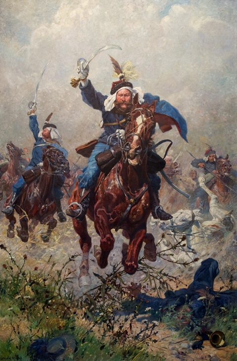 Oberst Maximilian Rodakowski an der Spitze seiner Ulanen in der Schlacht bei Custozza am 24. Juni 1866.